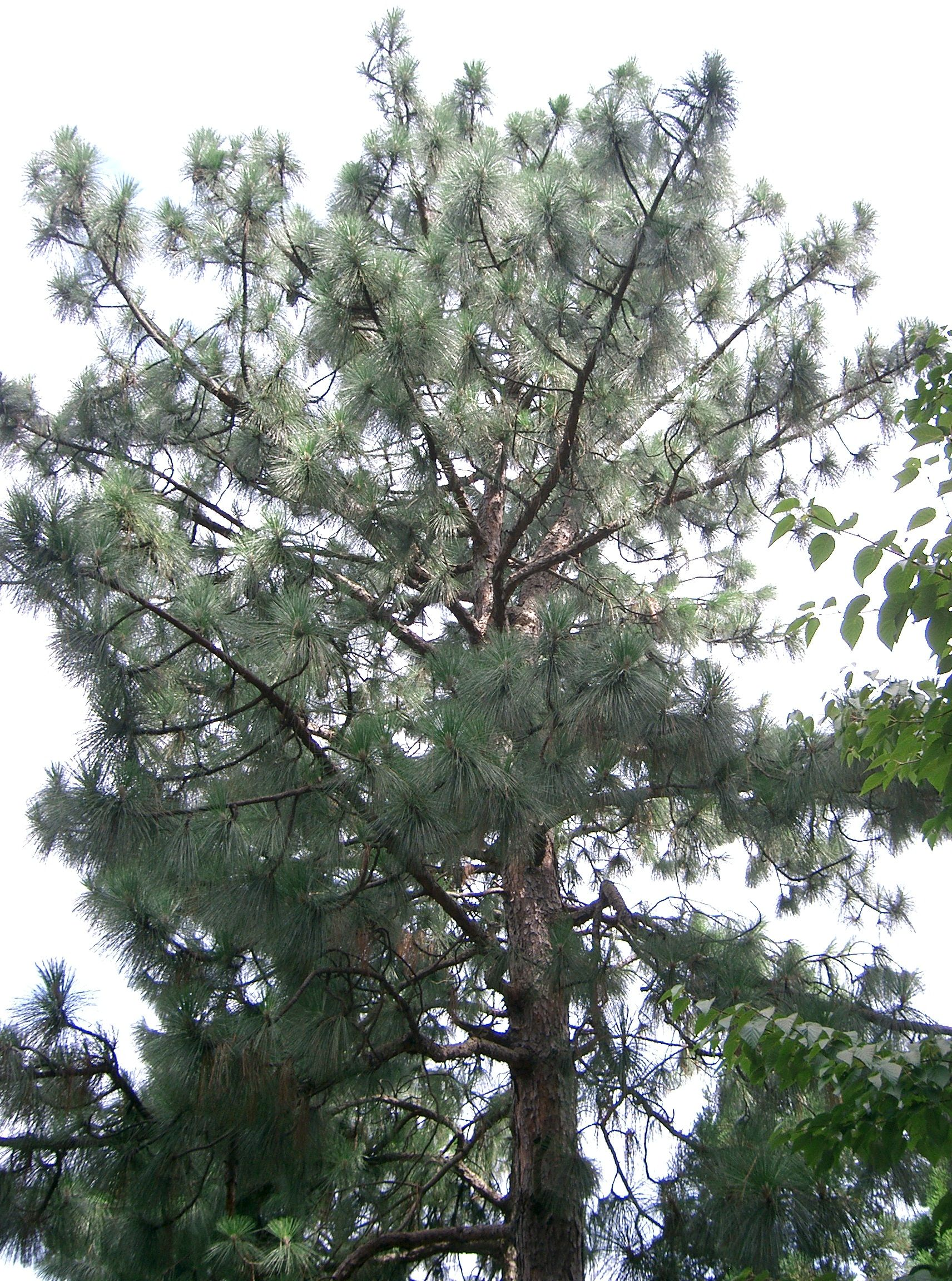 Pinus palustris